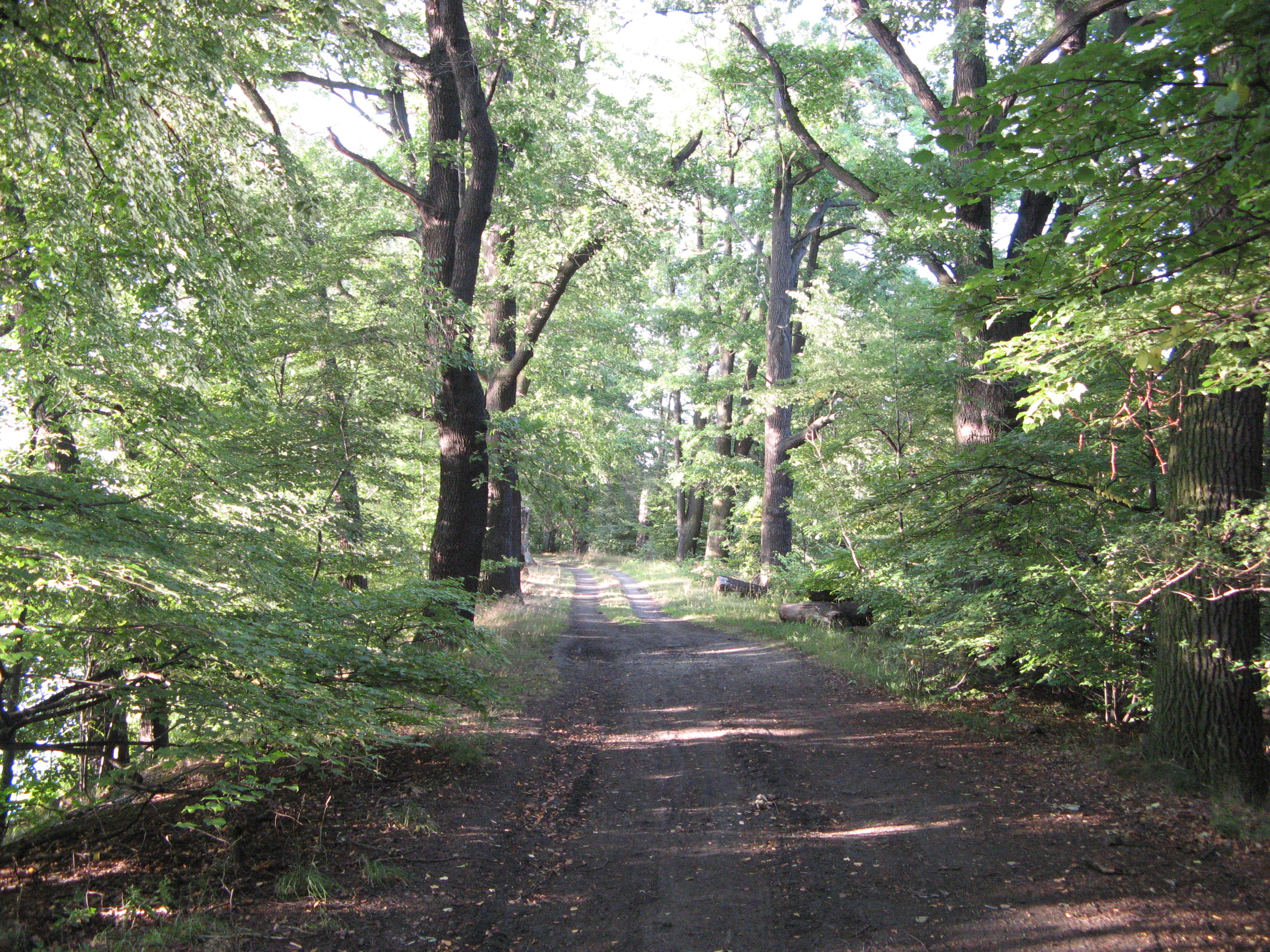 Rezerwat przyrody Łężczok aleja drzew pomnikowych na grobli rozdzielającej stawy